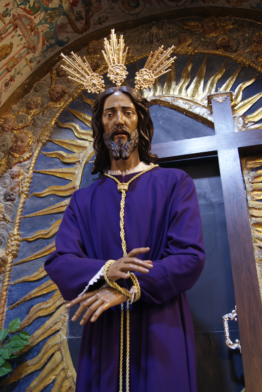 Imagen titular de la Hermandad de nazarenos de Jesús Redentor ante Caifás y Ntra. Sra. de la Estrella de Ávila